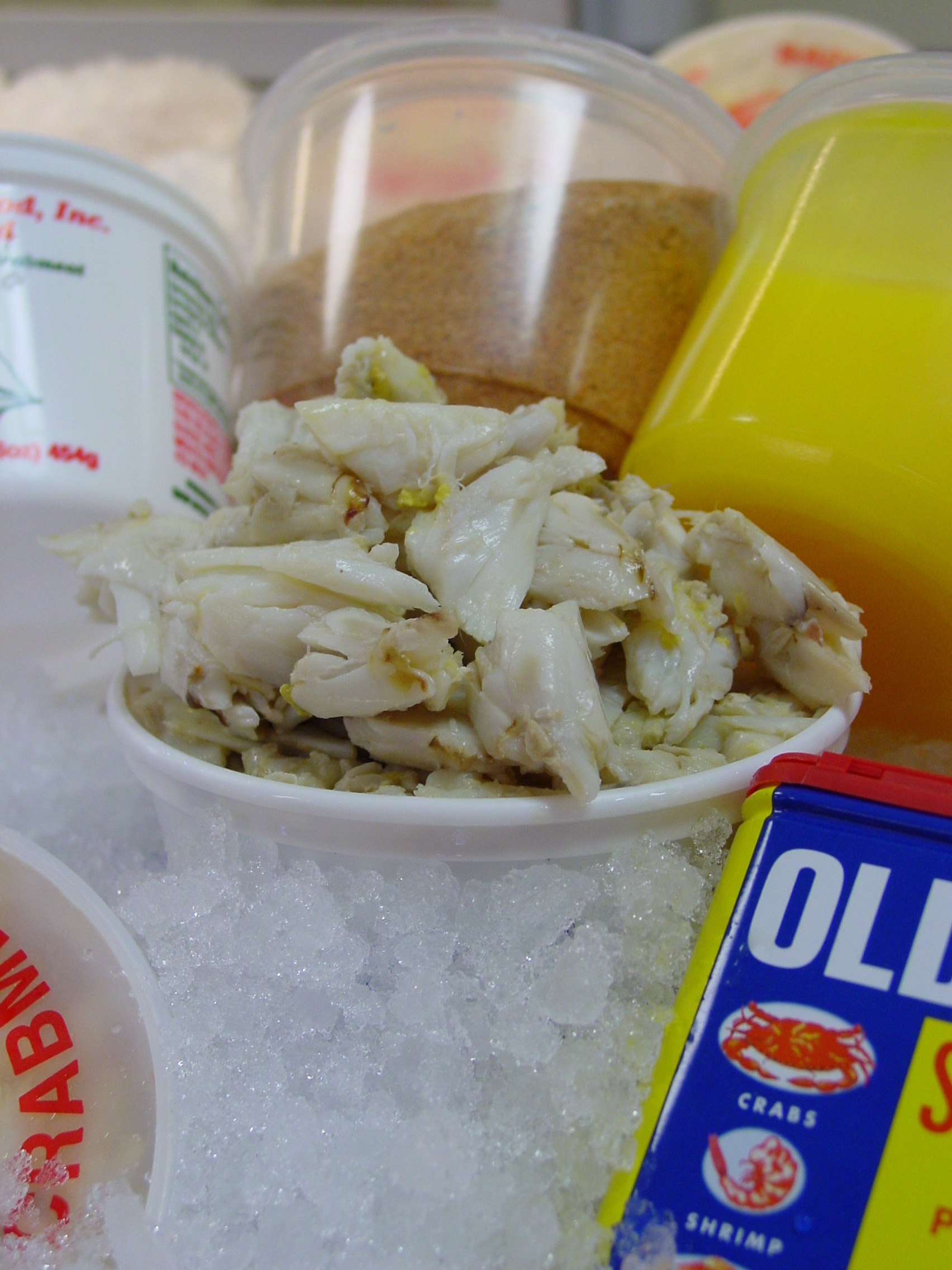 Lump crab meat